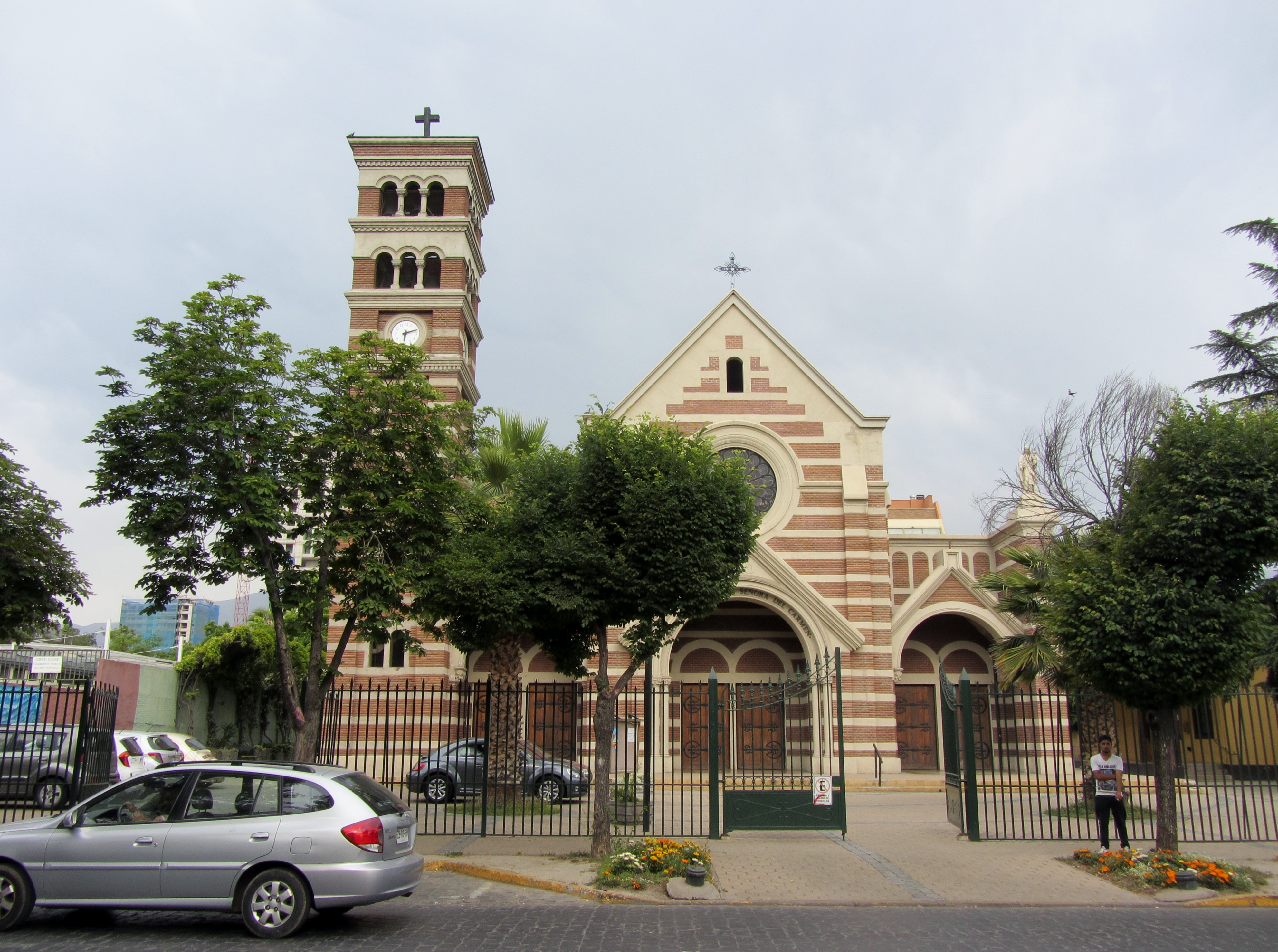 Iglesia de Nuestra Señora del Carmen, en la calle Francisco Molina, costado suroriente de la Plaza Ñuñoa